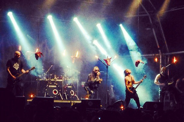 Mayhem actuando en el Primaver Sound de 2012 en Barcelona.